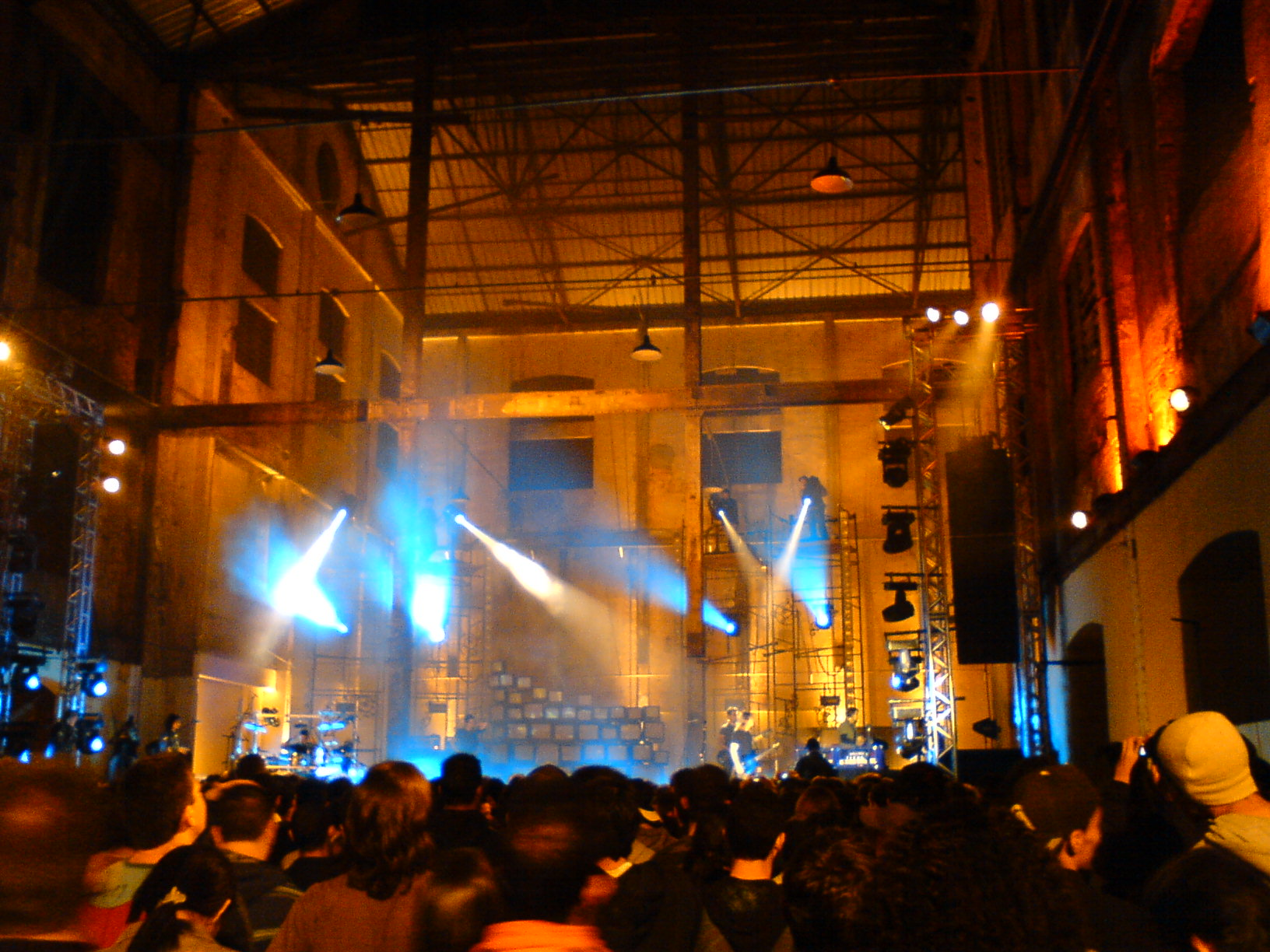 Oficina G3, durante a gravação de D.D.G. Experience, em 2009.